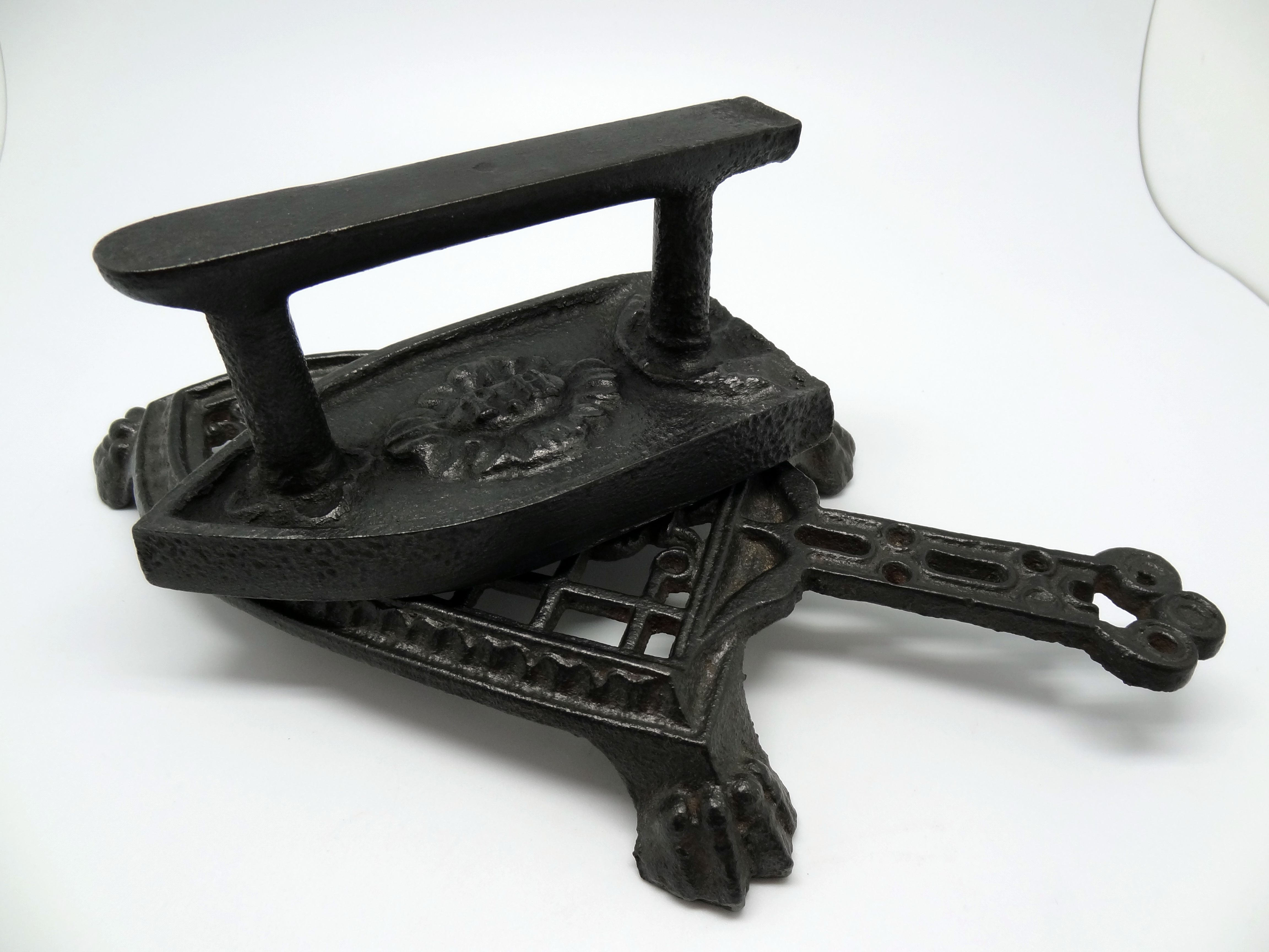 Objet en fonte : fer a repasser sur son support, de biais